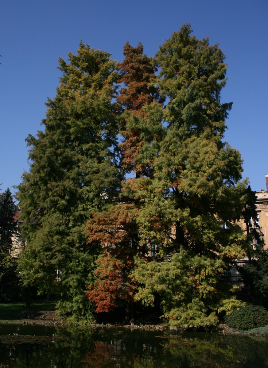 Botanički vrt PMF-a u Zagrebu